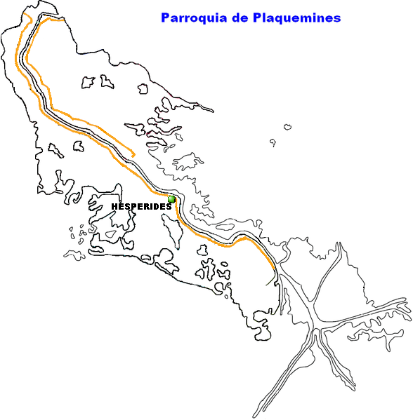 Hesperides, Louisiana.